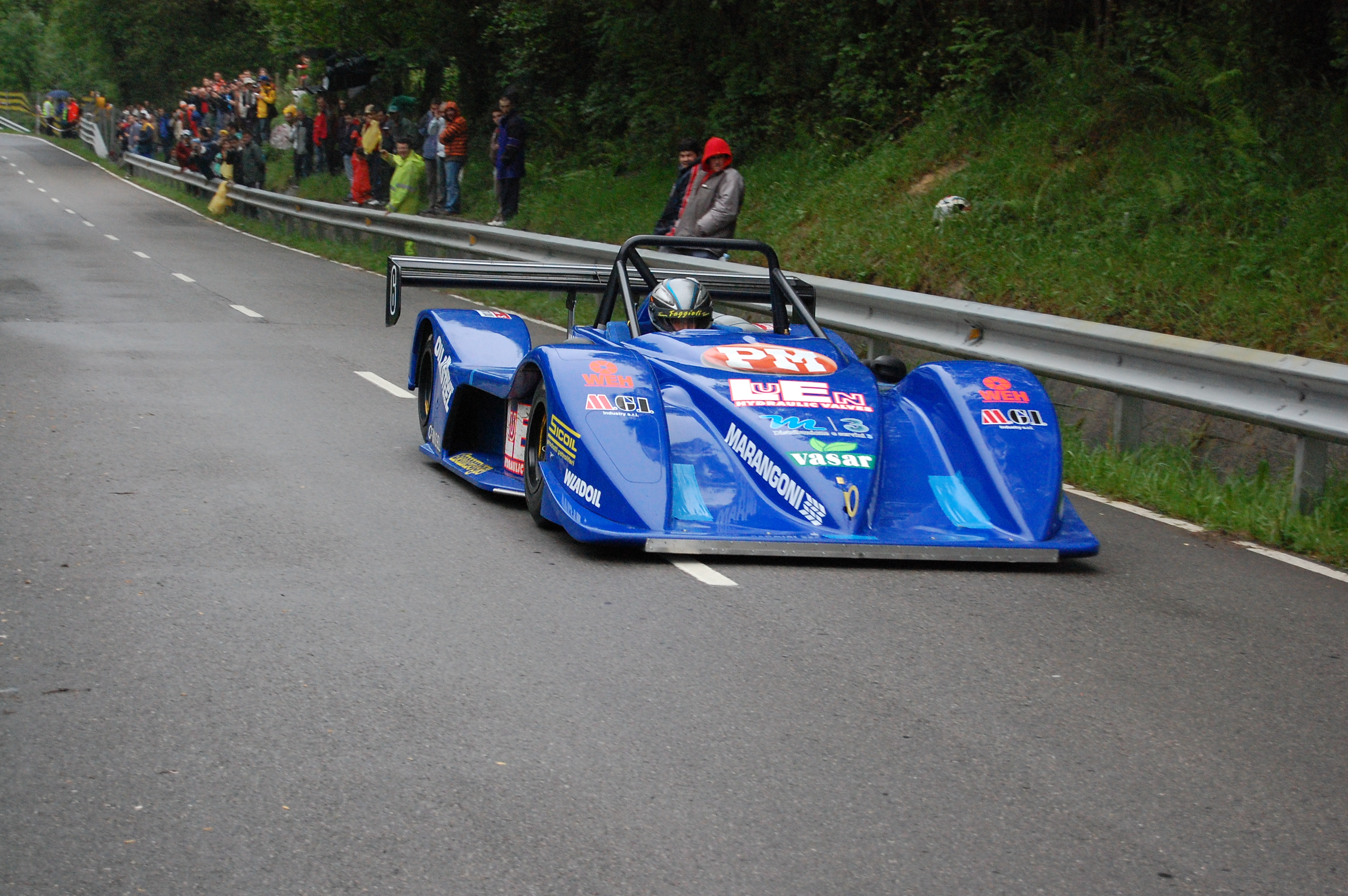 Subida al Fito 2008. Campeonato de Europa de Montaña